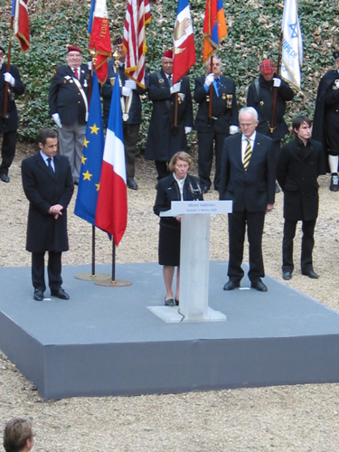 Französisch-deutsche Gedenkfeier am Mont Valerien bei Paris: Nicolas Sarkozy; Jürgen Rüttgers